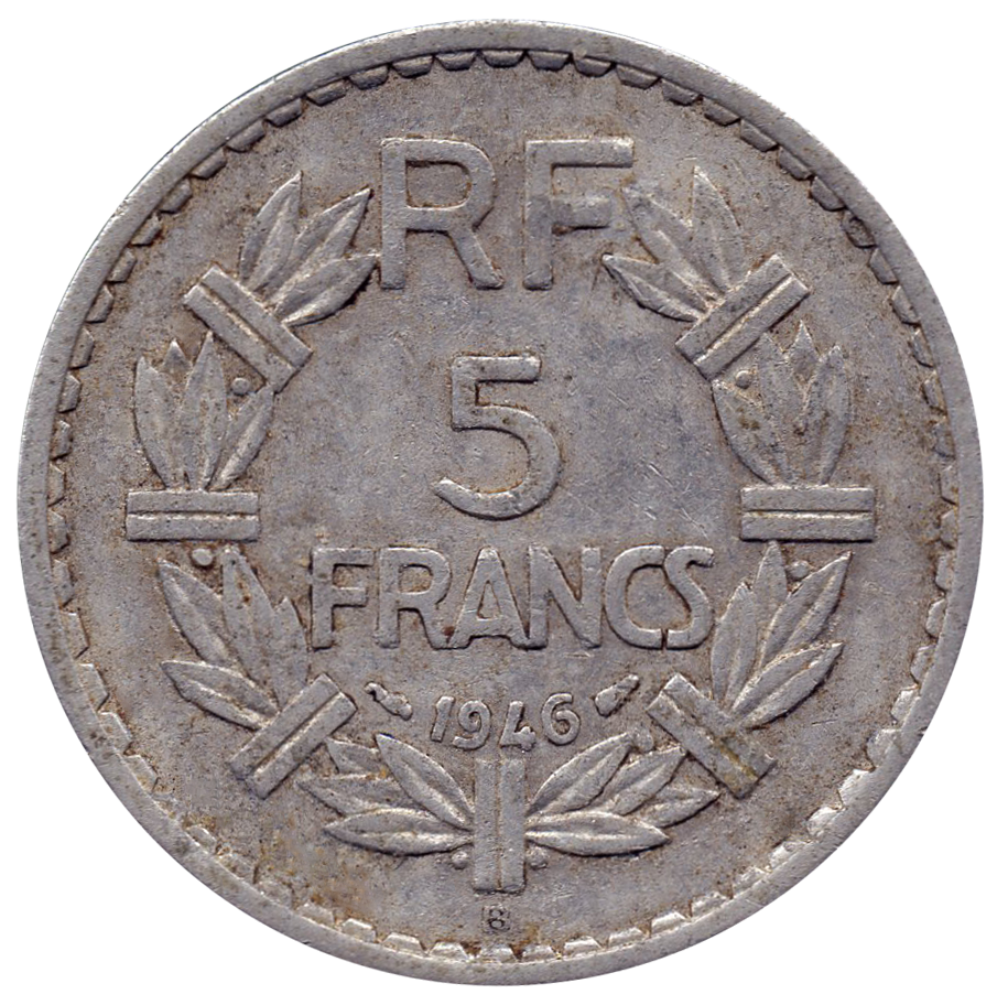 Revers 5 francs type Lavrillier émise en 1946